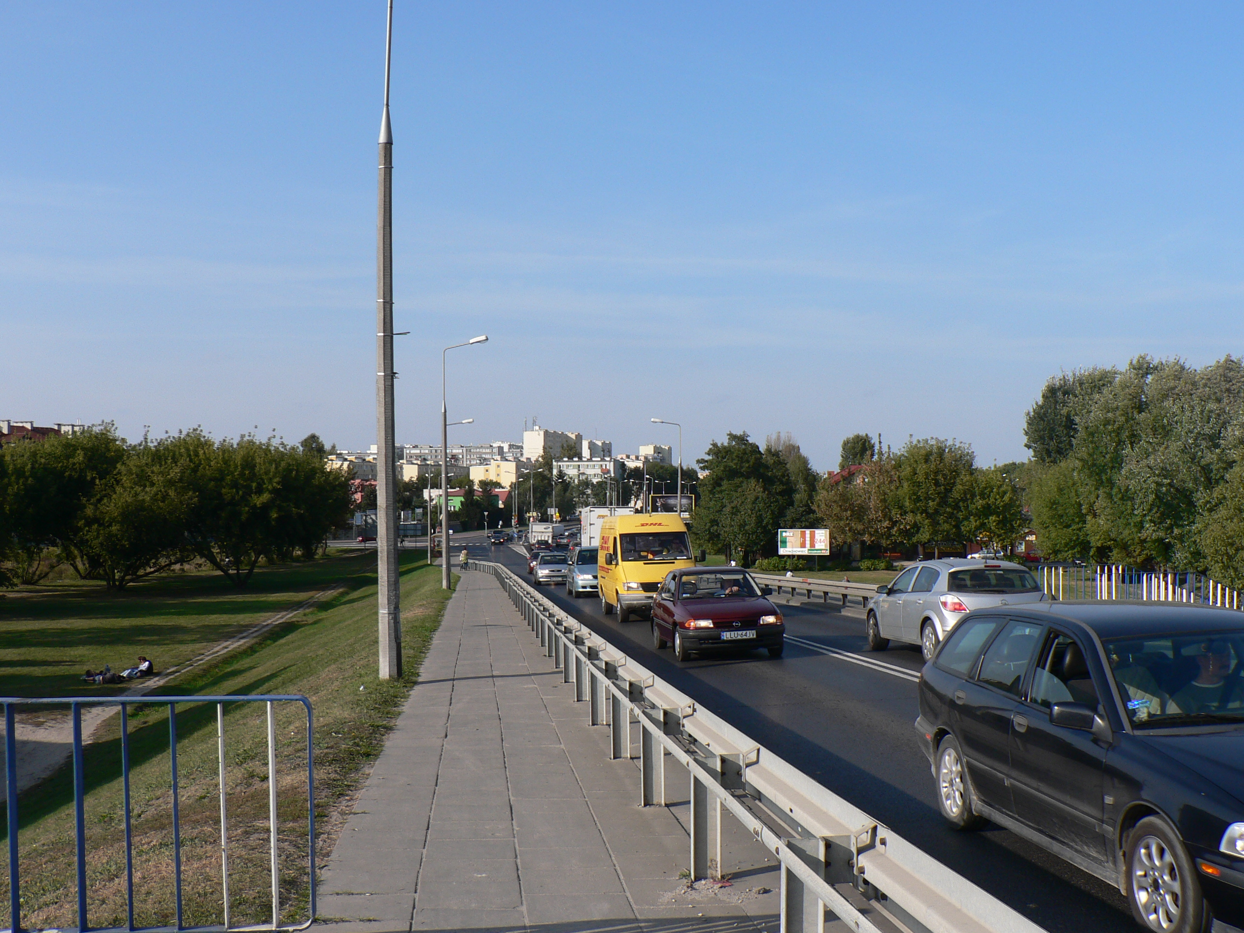 Widok z wiaduktu w Piastowie na północ